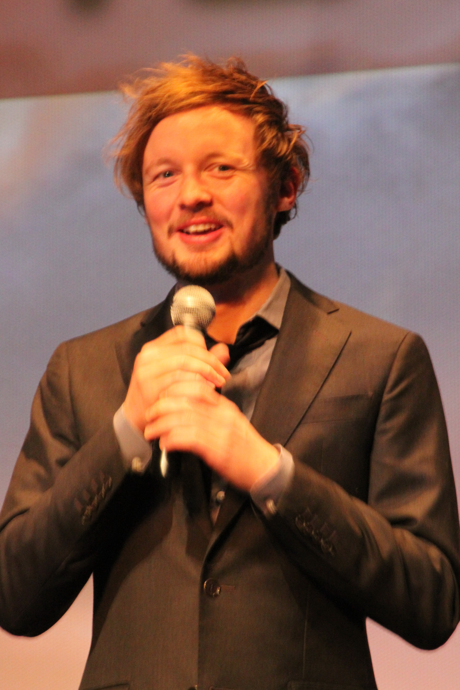 Glenn Erland Tosterud lors de la présentation du film "The Troll Hunter" au 18ème festival international de Gerardmer